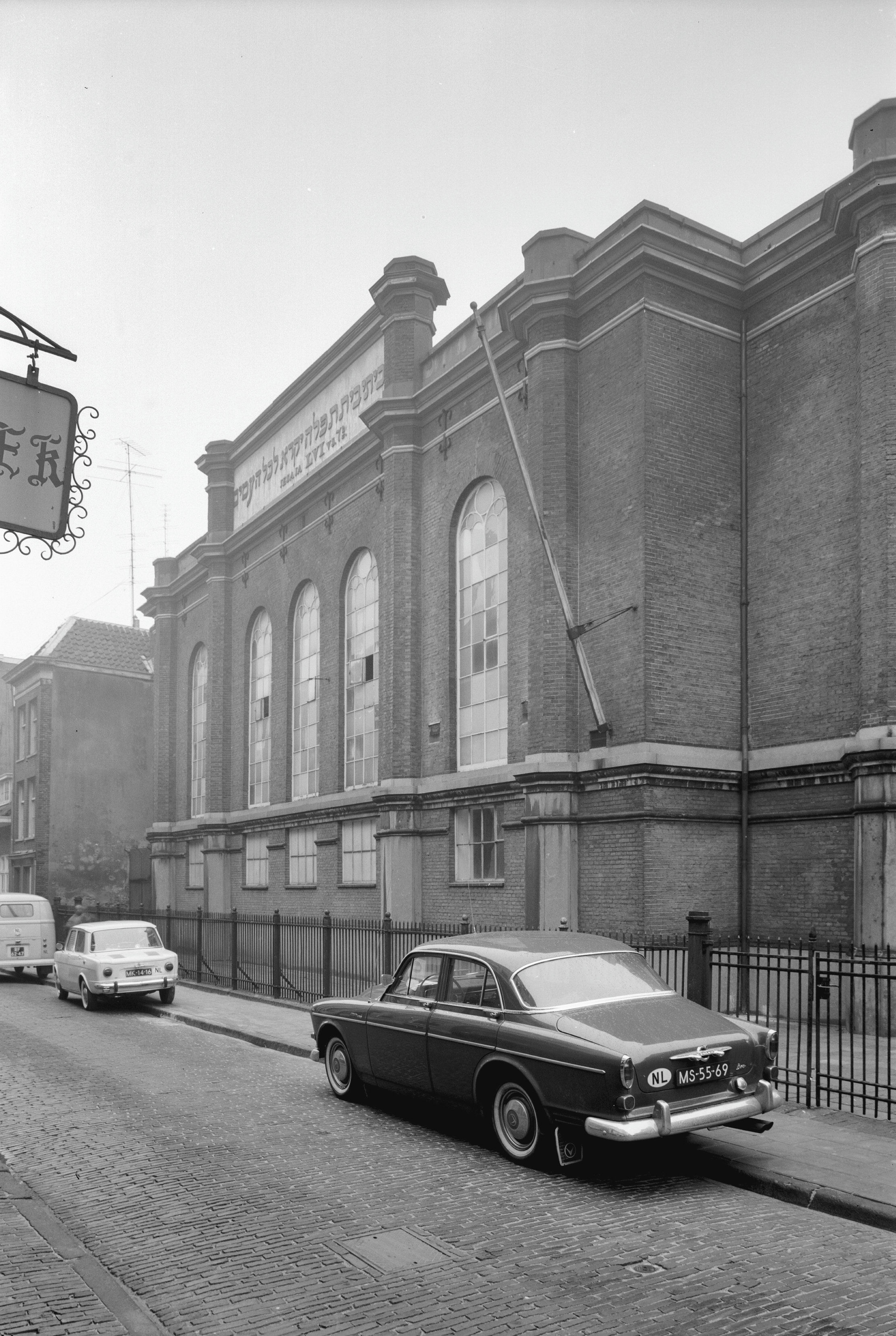 Synagoge: Pastoorstraat 17a, aanzicht exterieur